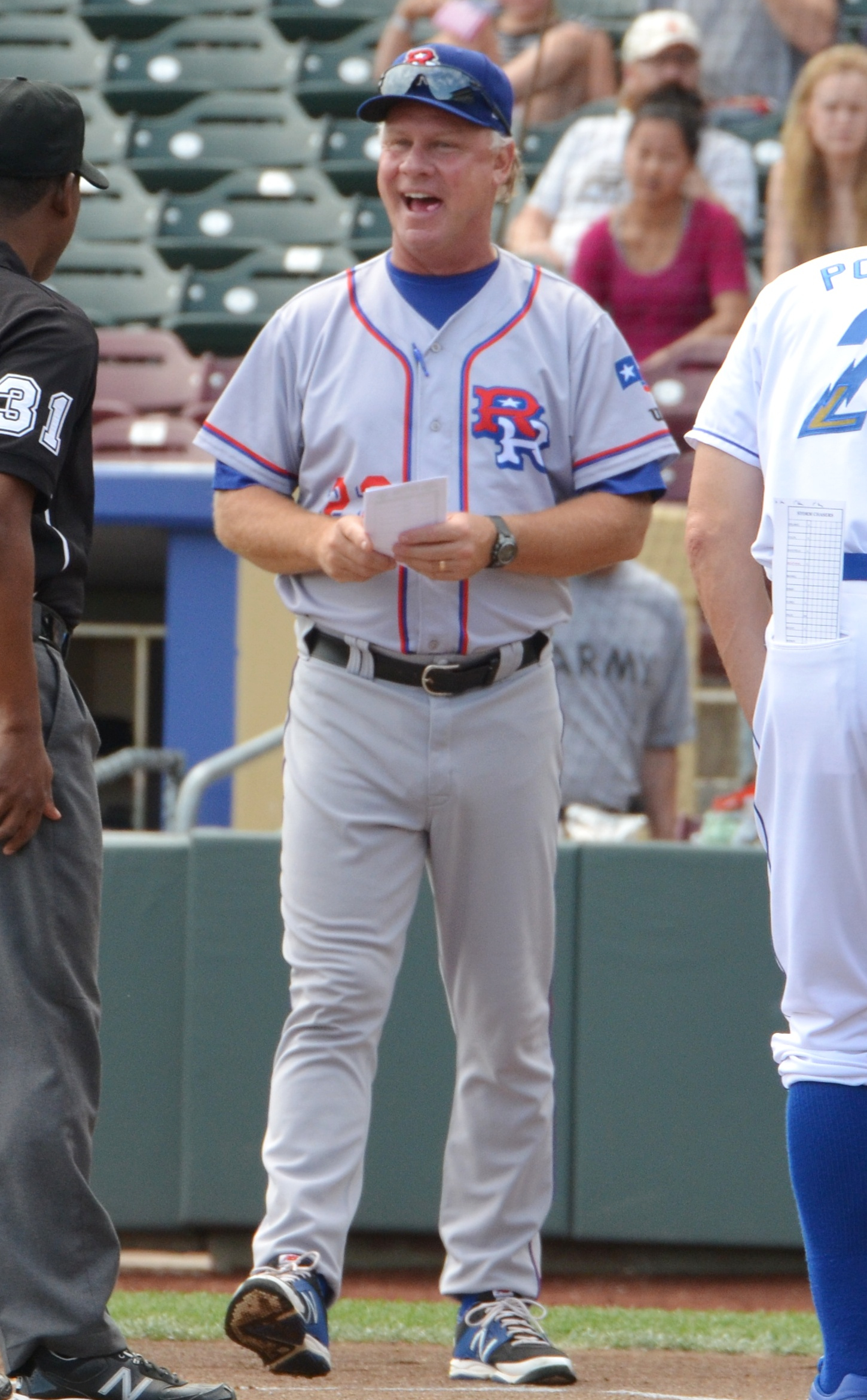 Steve Buechele